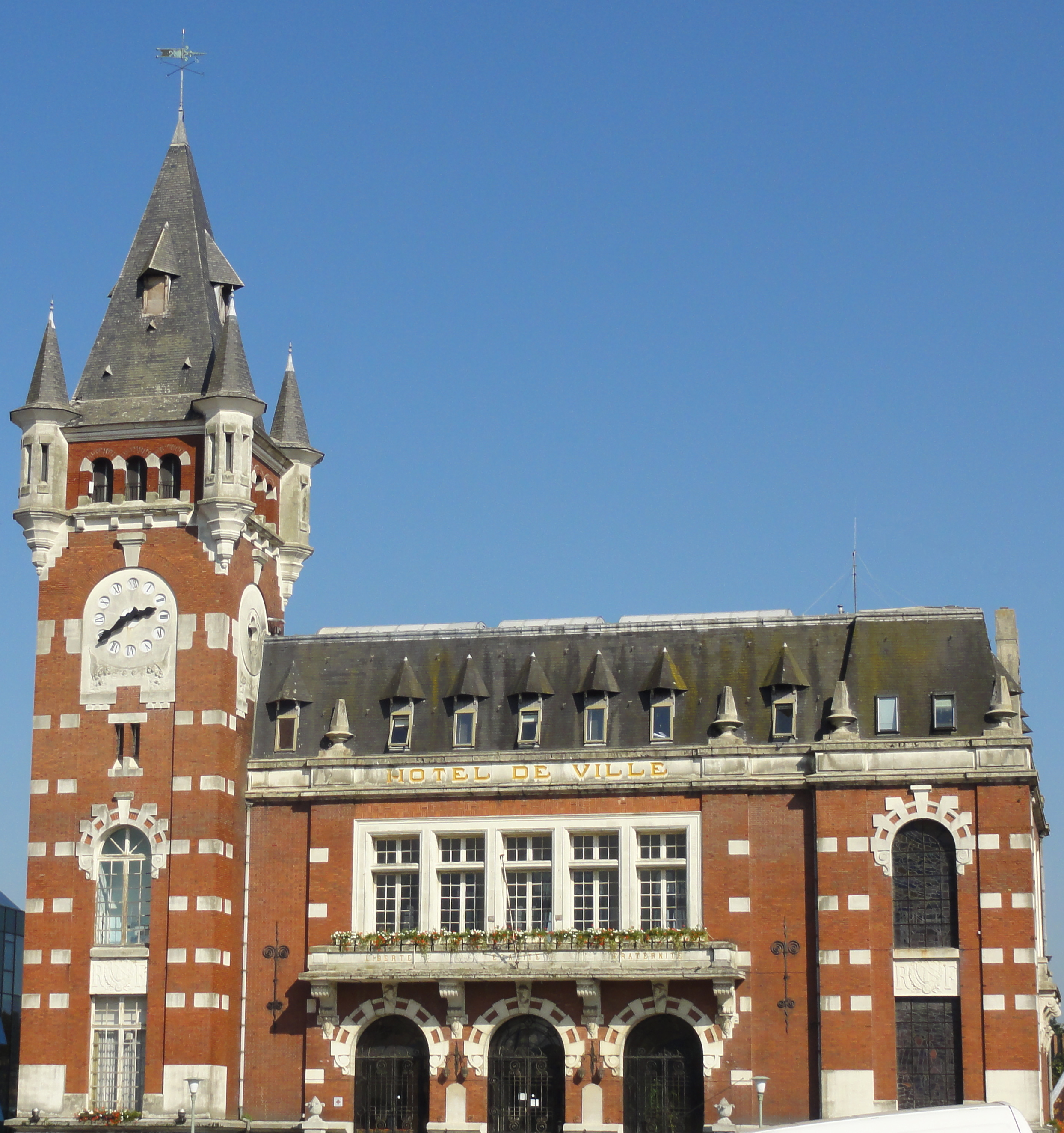 Hôtel de ville de Bruay-la-Buissière dans le bassin minier du Nord-Pas-de-Calais, Pas-de-Calais, Nord-Pas-de-Calais, France. .